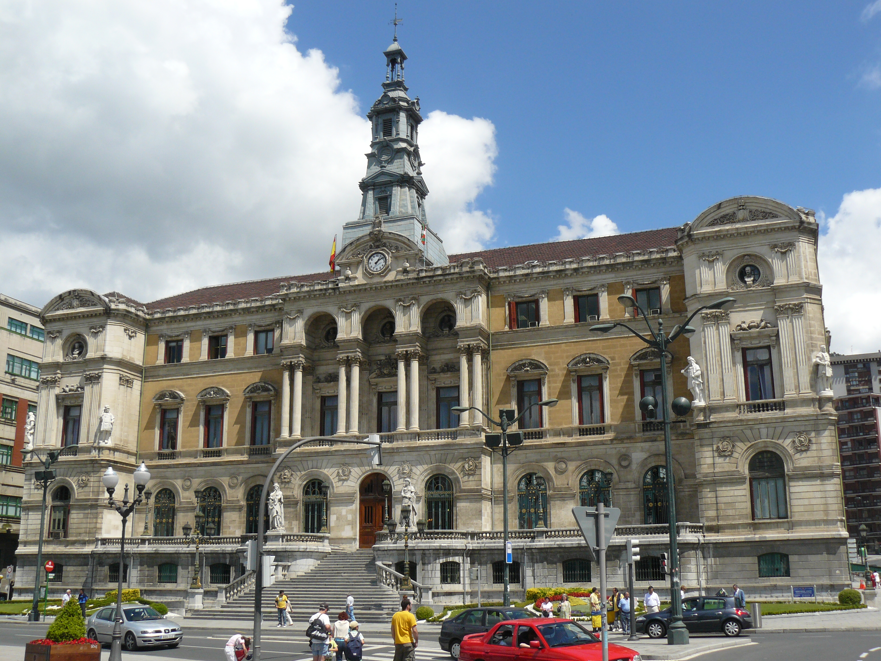 Bilboko udaletxea